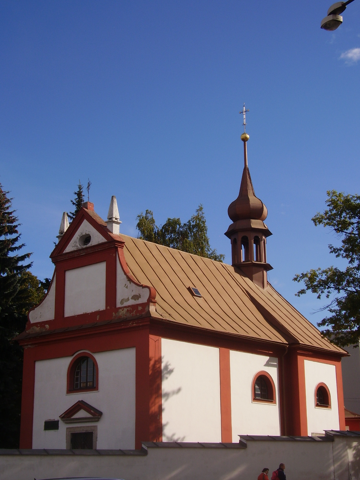 Kaple hřbitovní, Nejsvětější Trojice, Žďár nad Sázavou, ulice Horní